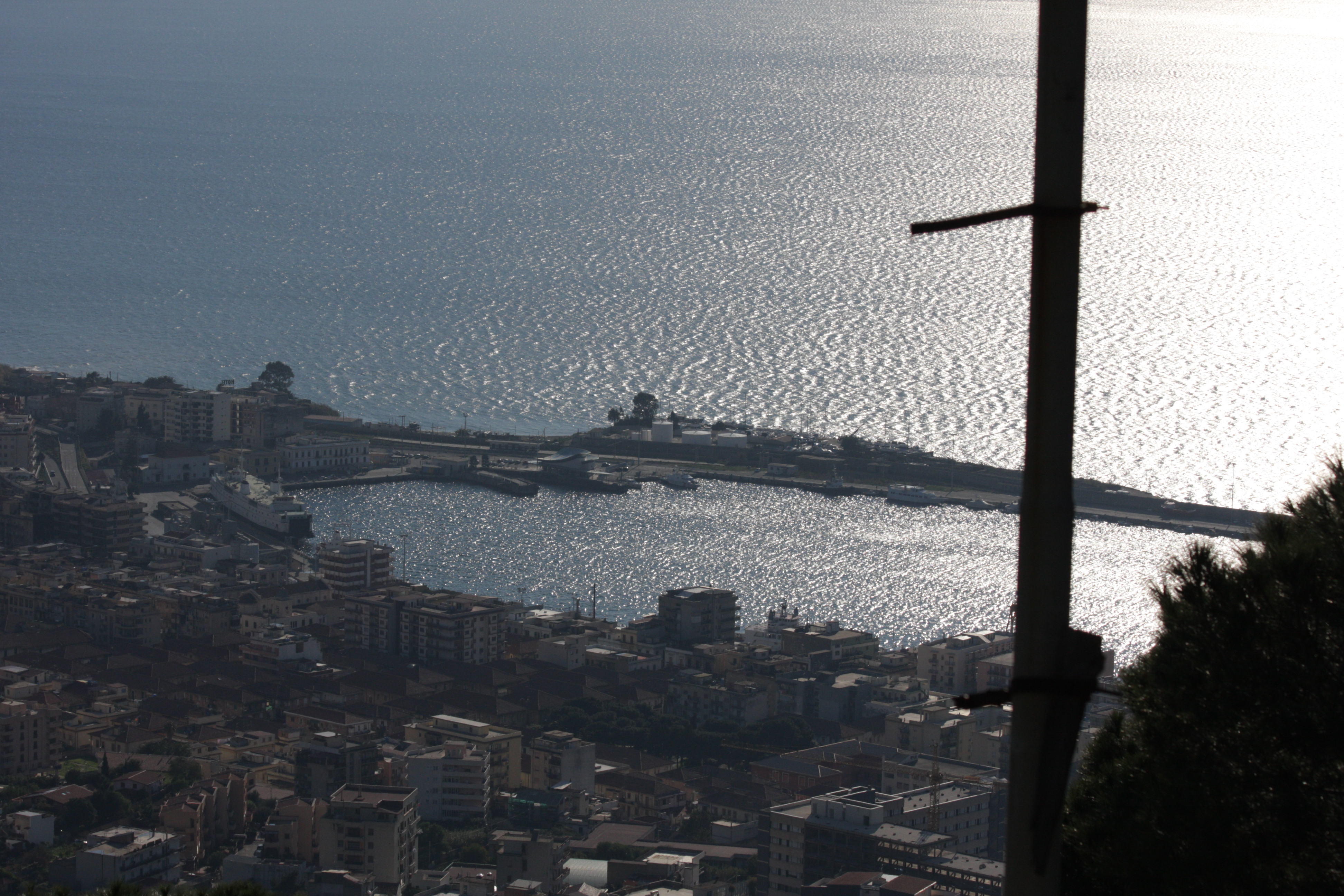 Il porto cittadino visto dalla collina di Pentimele